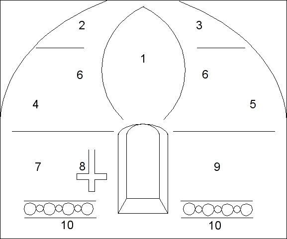 Disposition des fresques dans l'abside de l'église de Nohant-Vic